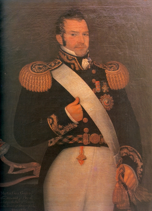 Retrato del marino inglés Martín Guise (1780-1828)